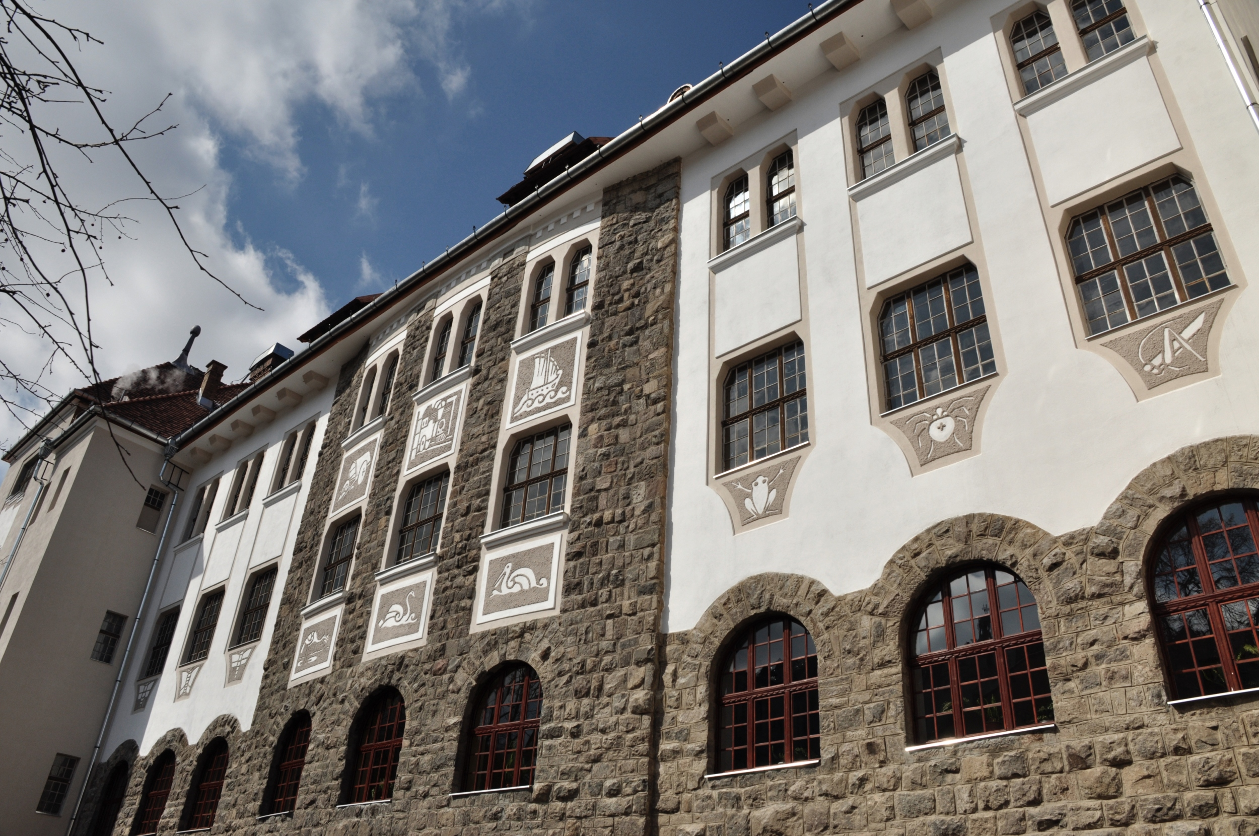 Liceul reformat "Baczkamadarasi Kis Gergely"